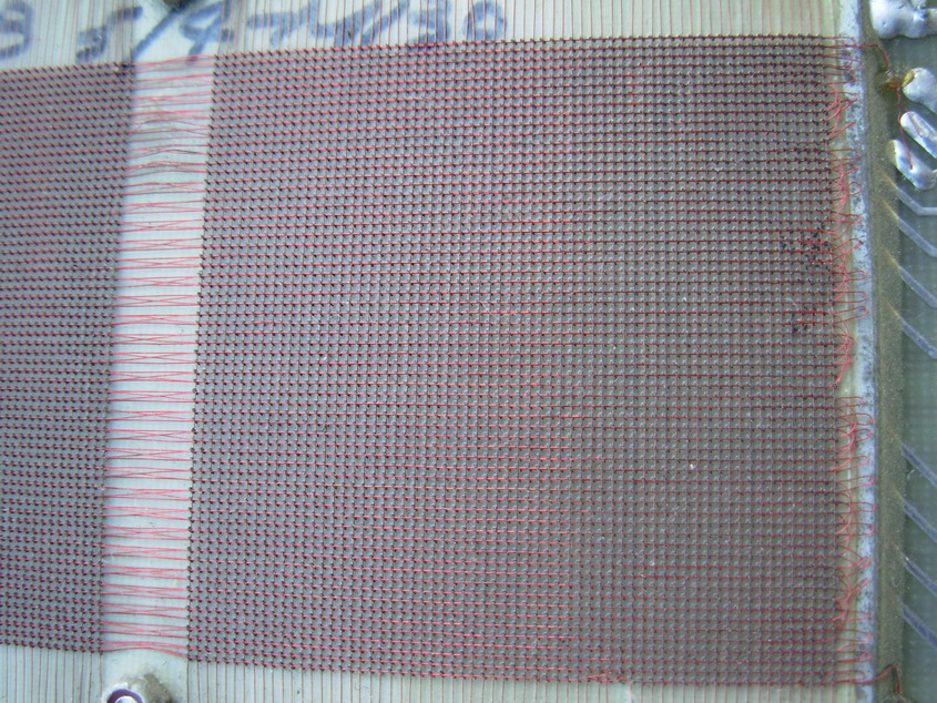 Memoria de ordenador de la decada de los 80s donde se pueden ver los bits fisicos. Este conjunto de unos 4x4 cm. corresponden a 512 bytes (0,5 Kb.). Para entender la tremenda evolución de las memorias, valga el ejemplo que se necesitarian 538 conjuntos para contener esta imagen. Phisical bit from 1980s computer. It represents 512 bytes.